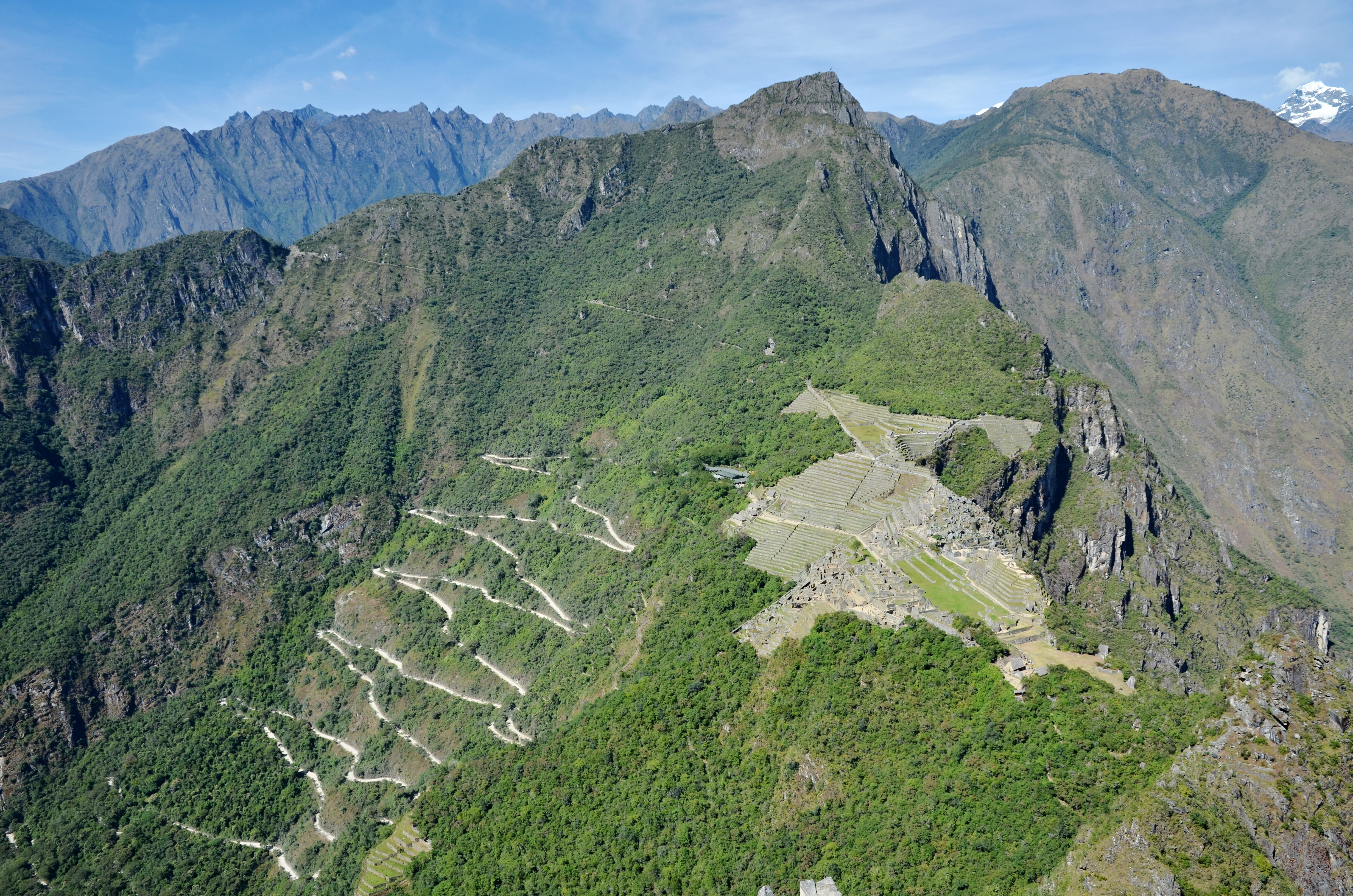 Machu Picchu a příjezdová cesta